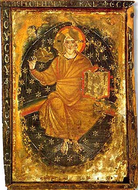 Ветхий денми. Икона VII в. (Мон-рь вмц. Екатерины на Синае)